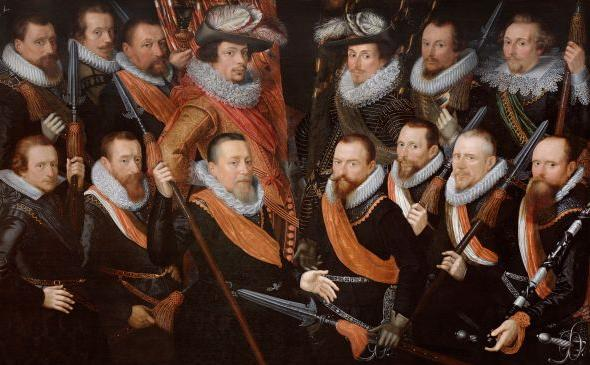 voor de Oude of St. Jorisdoelen, Alkmaar. In de bovenste rij in het midden zijn die twee vaandrigs, links waarschijnlijk Allart Jansz Crombalgh (-1634), toekomstige echtgenoot van de schrijfster Maria Tesselschade (1594-1649), en rechts Jan Pietersz Bijlevelt (-1654).